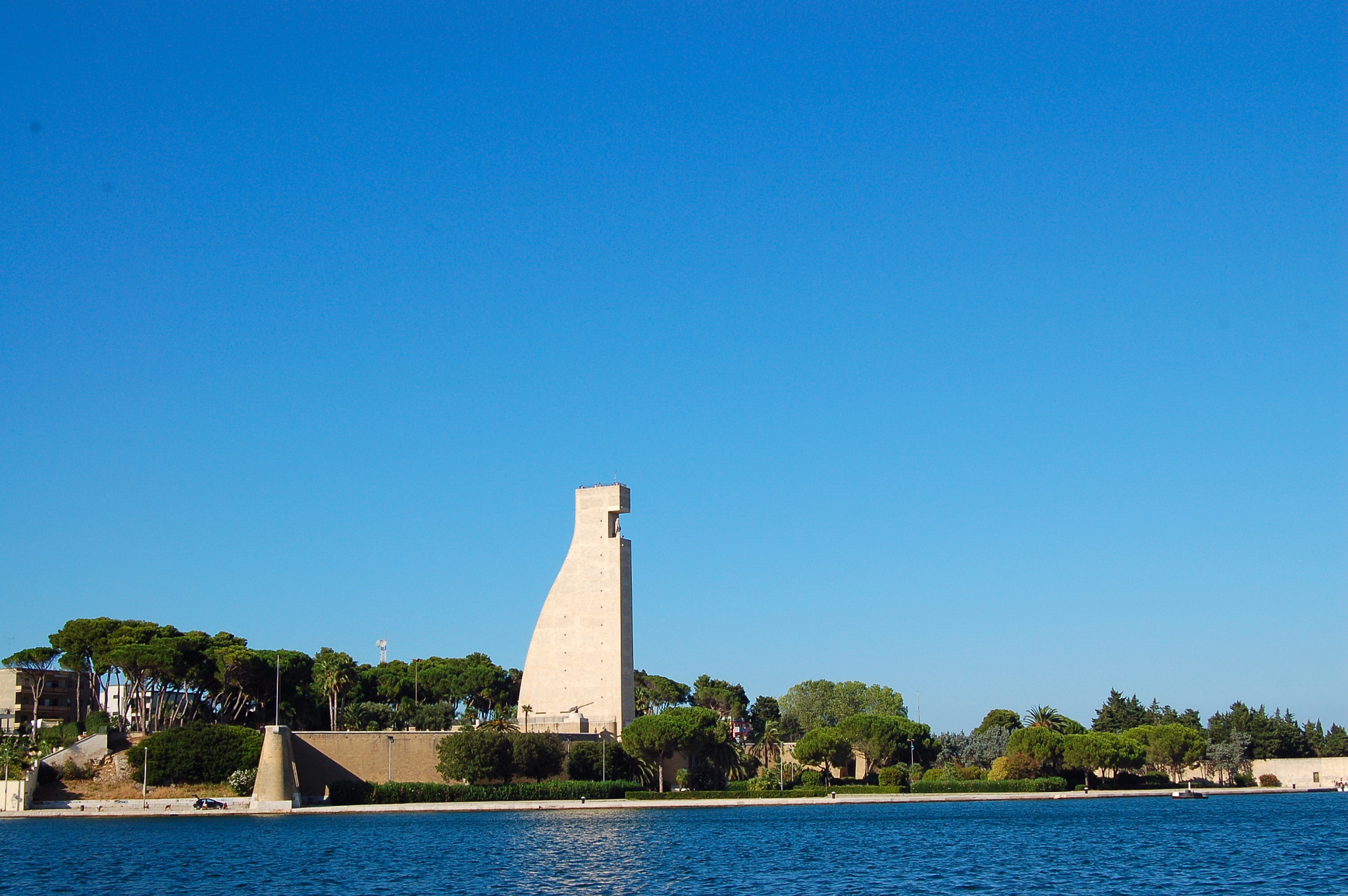 Brindisi